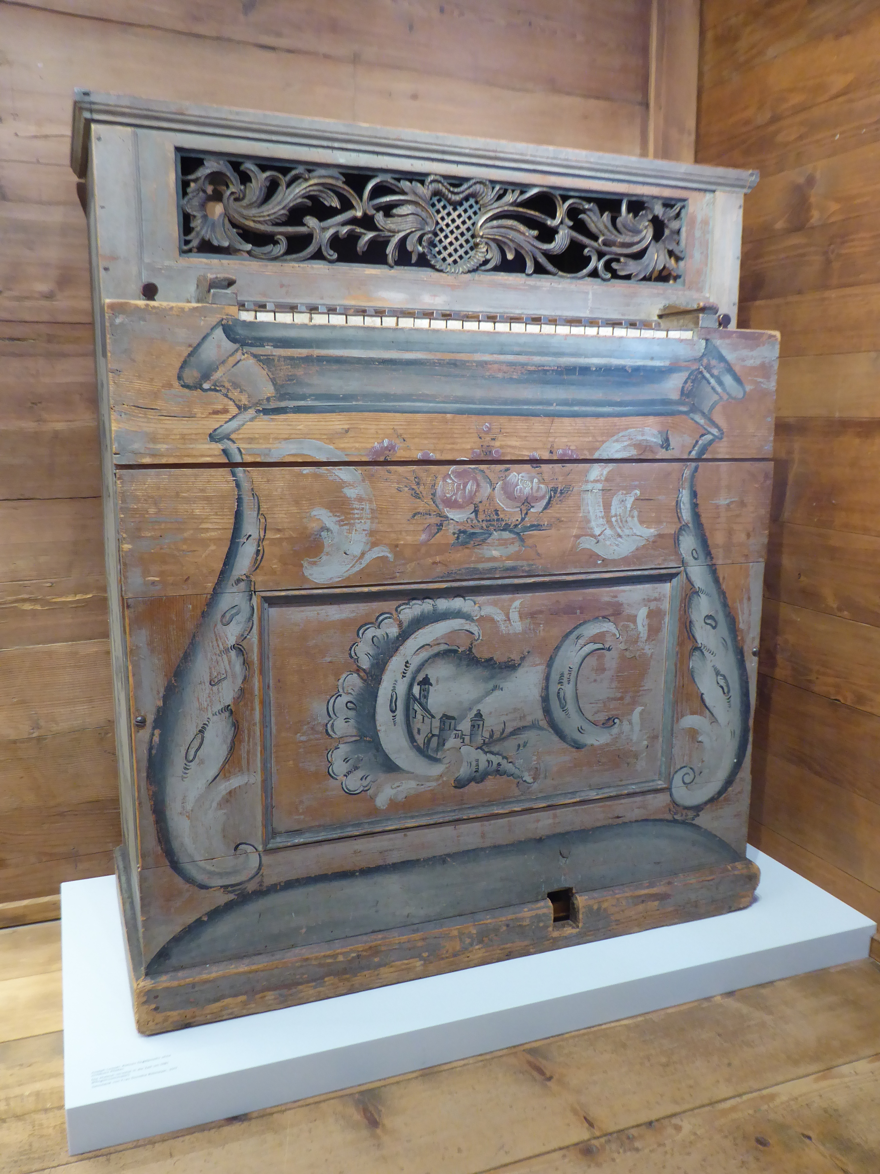 Kleines Orgelpositiv ohne sichtbare Pfeifen von Josef Looser. Die Malerei vom «Pfingtrosenmaler» verweist auf die Zeit um 1780.